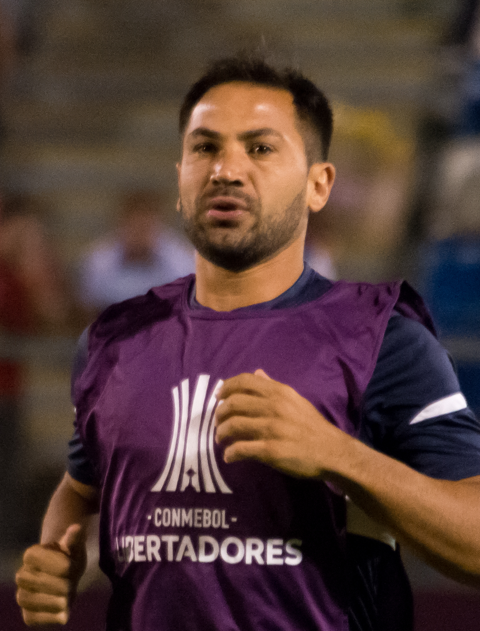 Fabián Rinaudo, Universidad Católica v Rosario Central, Estadio San Carlos de Apoquindo, Las Condes, Santiago, Chile.